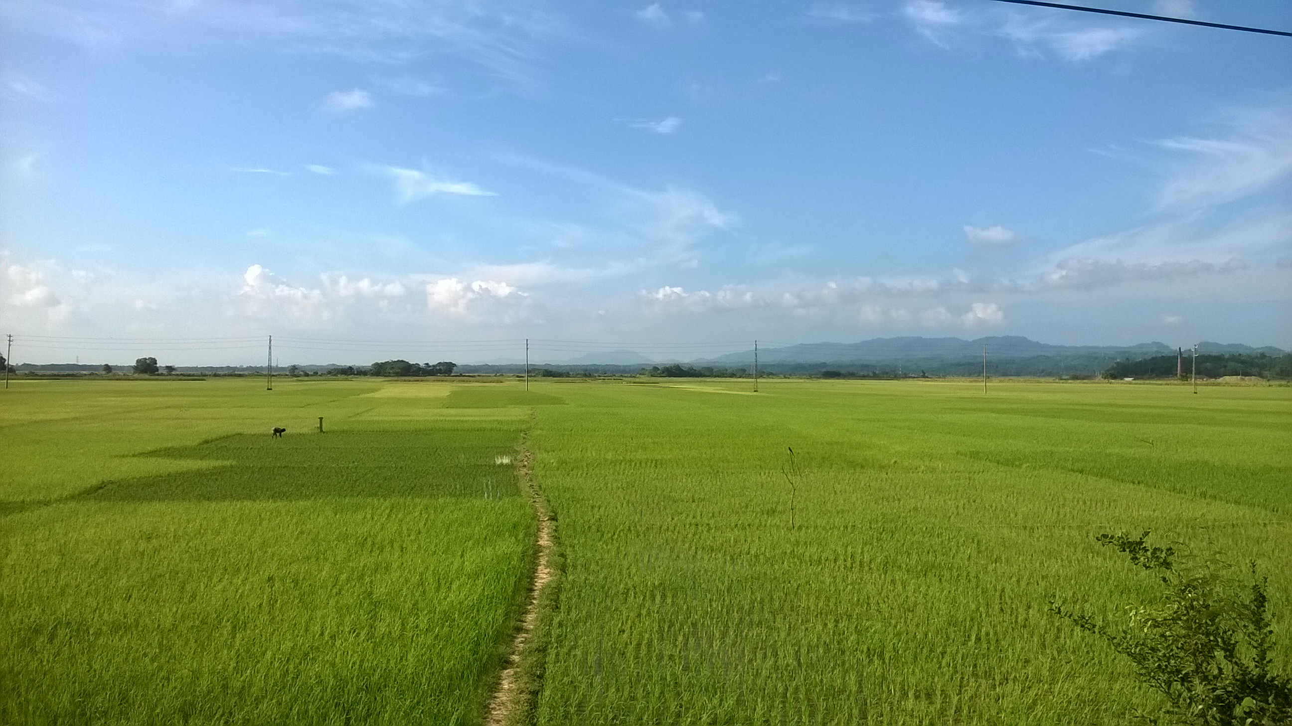 গুমাই বিল এর একাংশ